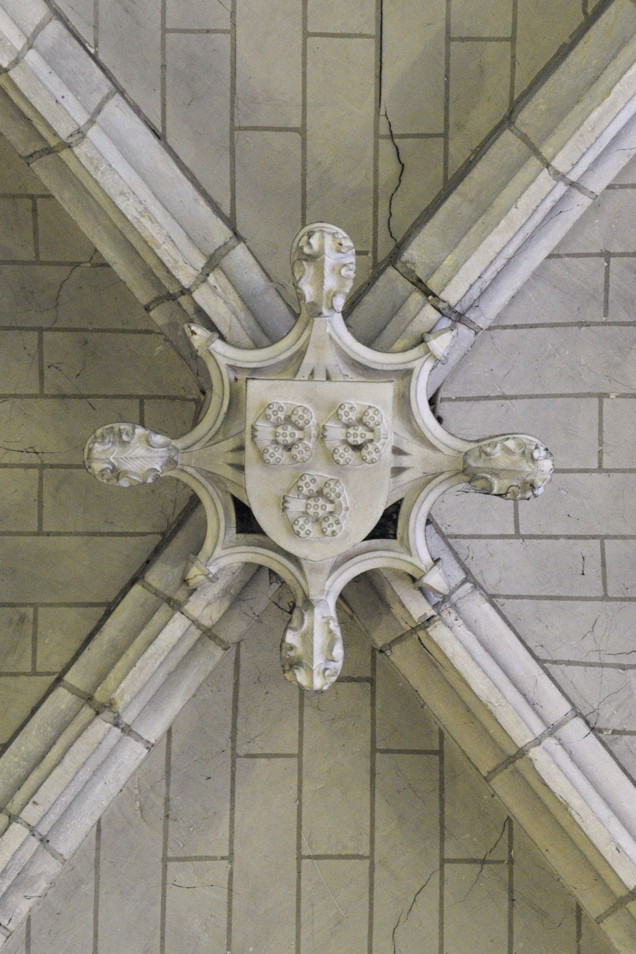 Katholische Pfarrkirche Saint-Clément in Arpajon im Département Essonne (Île-de-France/Frankreich), Schlussstein im südlichen Seitenschiff